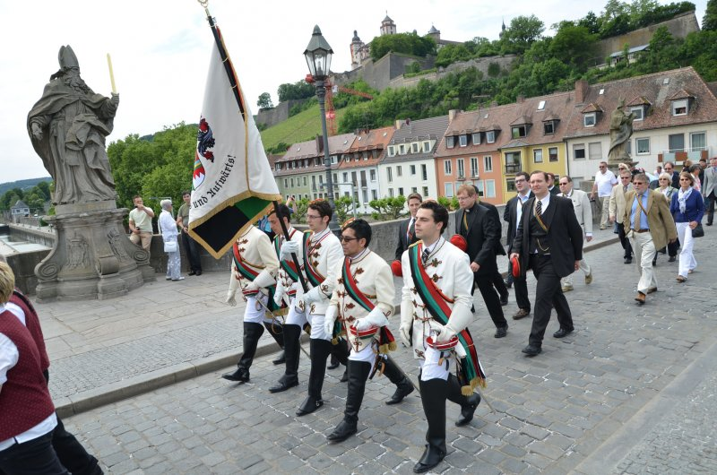 Umzug der K.D.St.V. Thuringia zu Würzburg im CV über die Alte Mainbrücke in Würzburg anlässlich ihres 110. Stiftungsfestes 2012